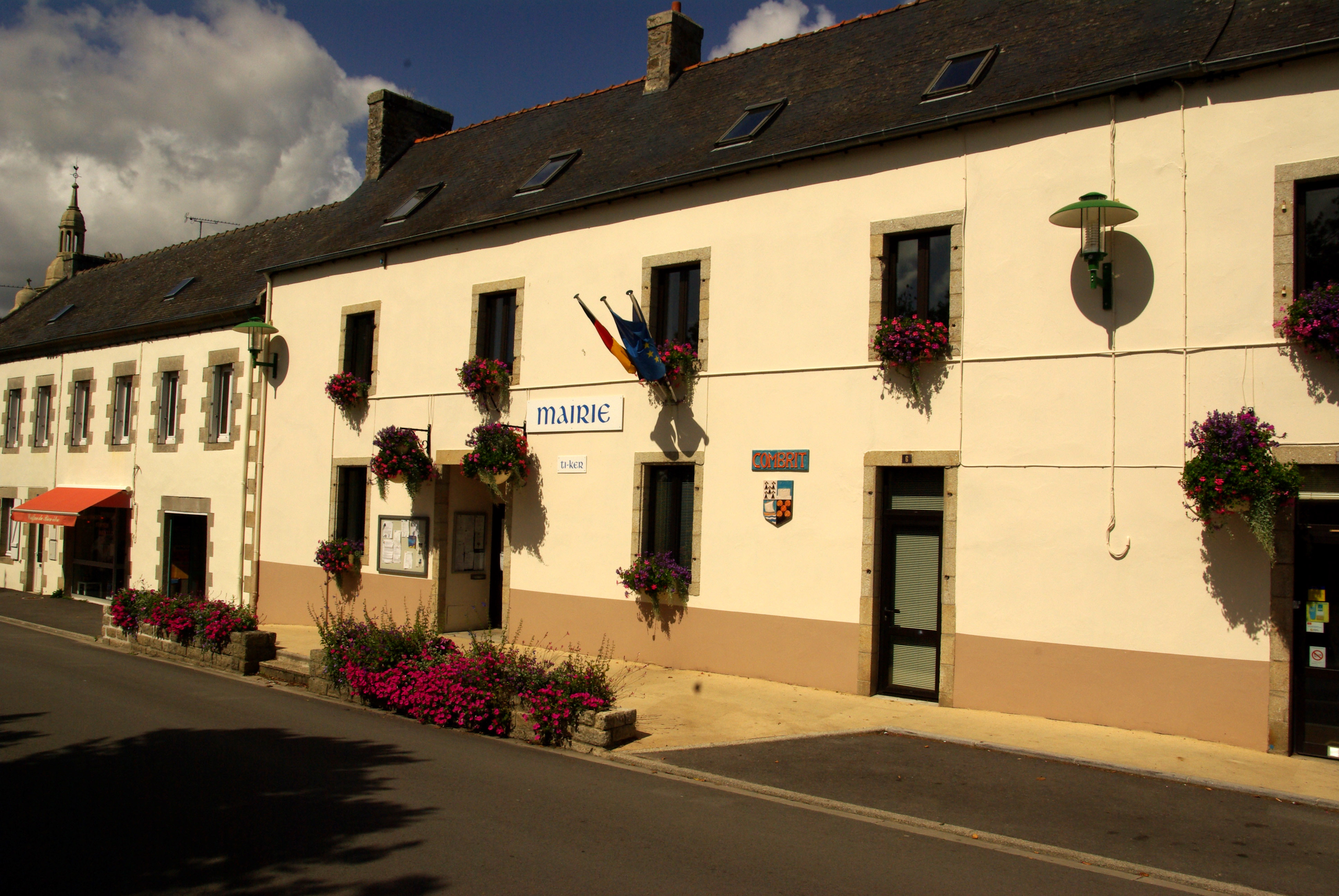 Gemeentehuis van Combrit